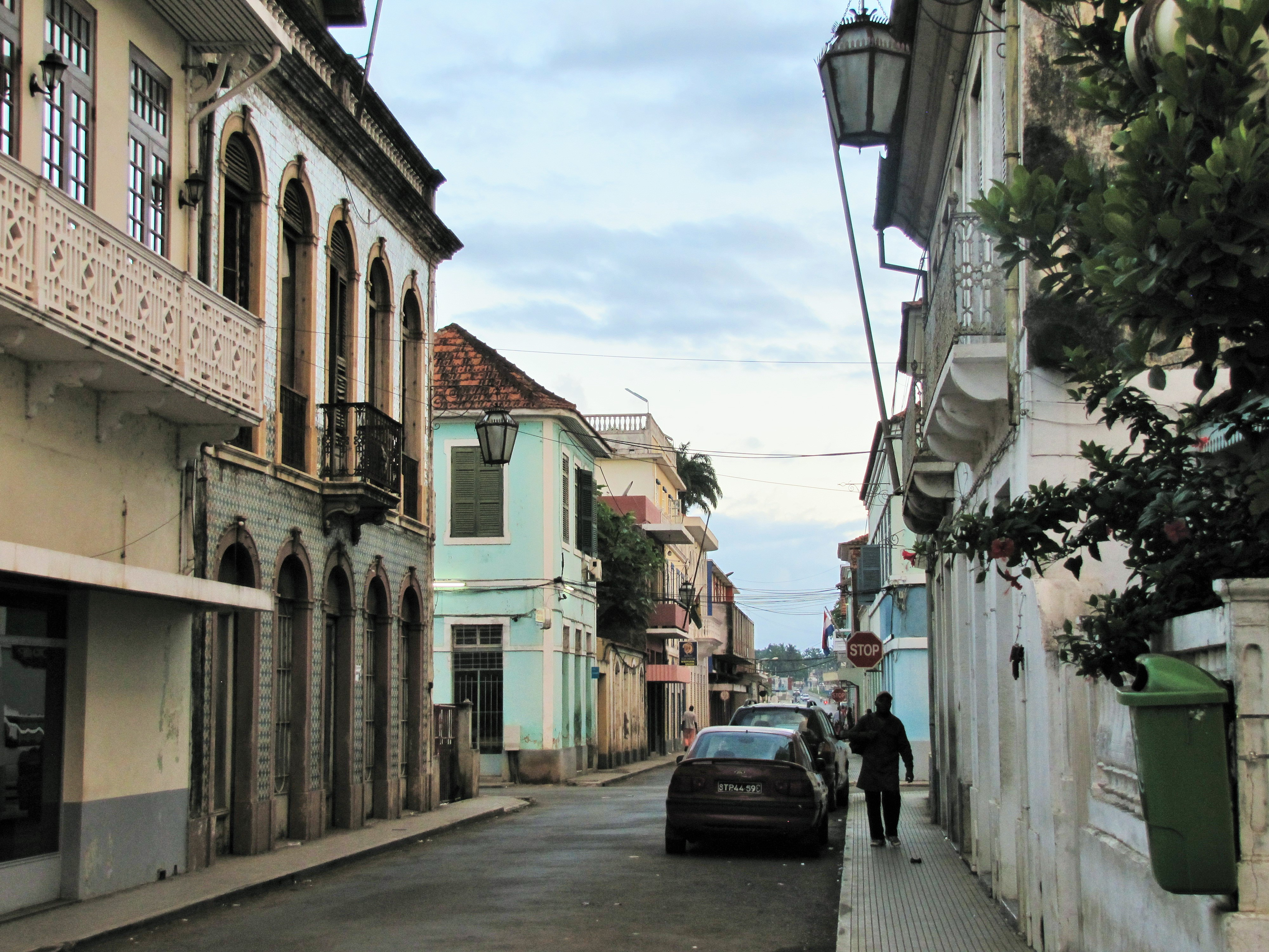 Sao Tome 9